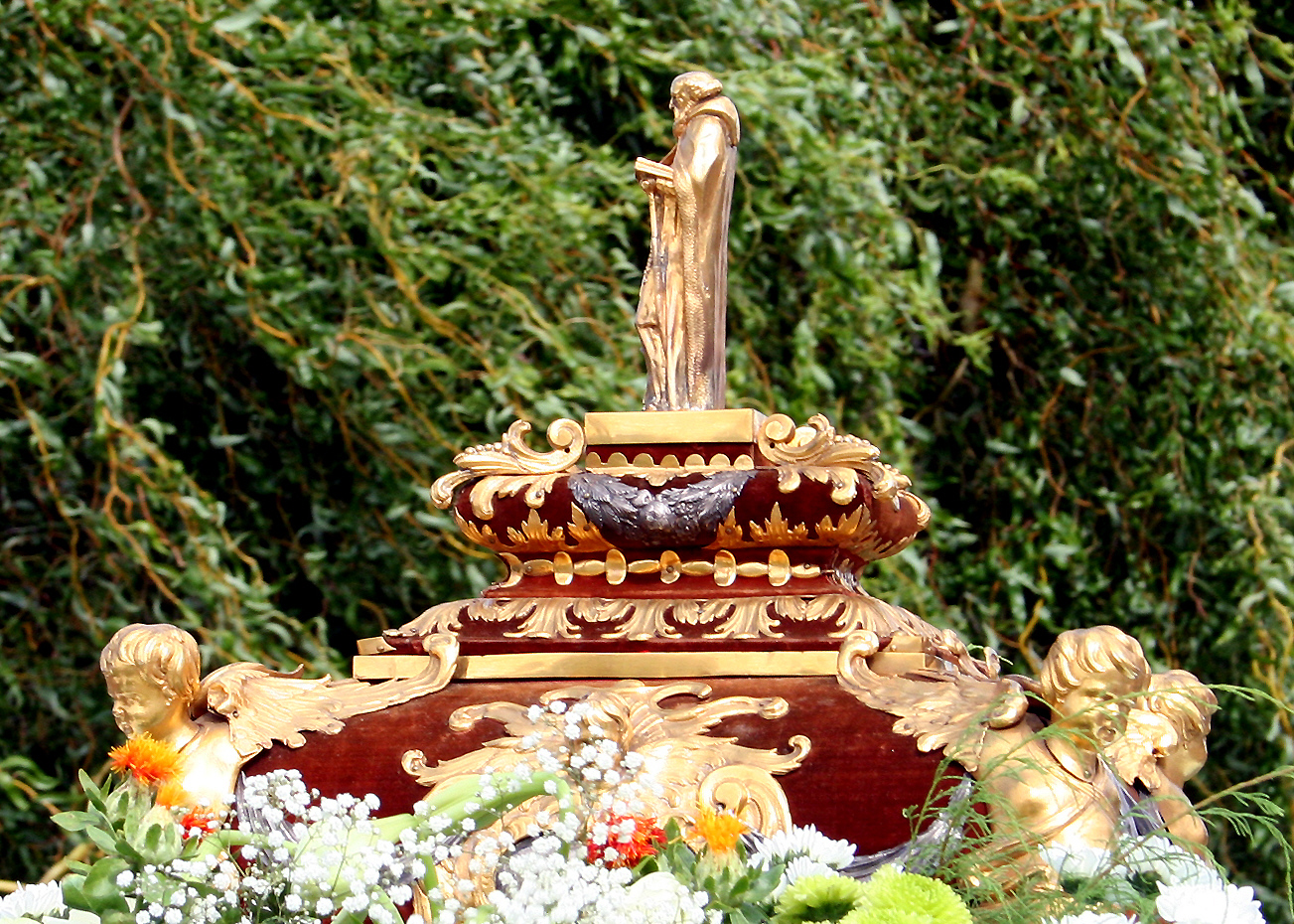 Havré (Belgique), reliquaire de Saint-Antoine-en-Barbefosse présenté à la processsion dédiée à Notre-Dame de Bon Vouloir lors de la fête de l'Assomption.